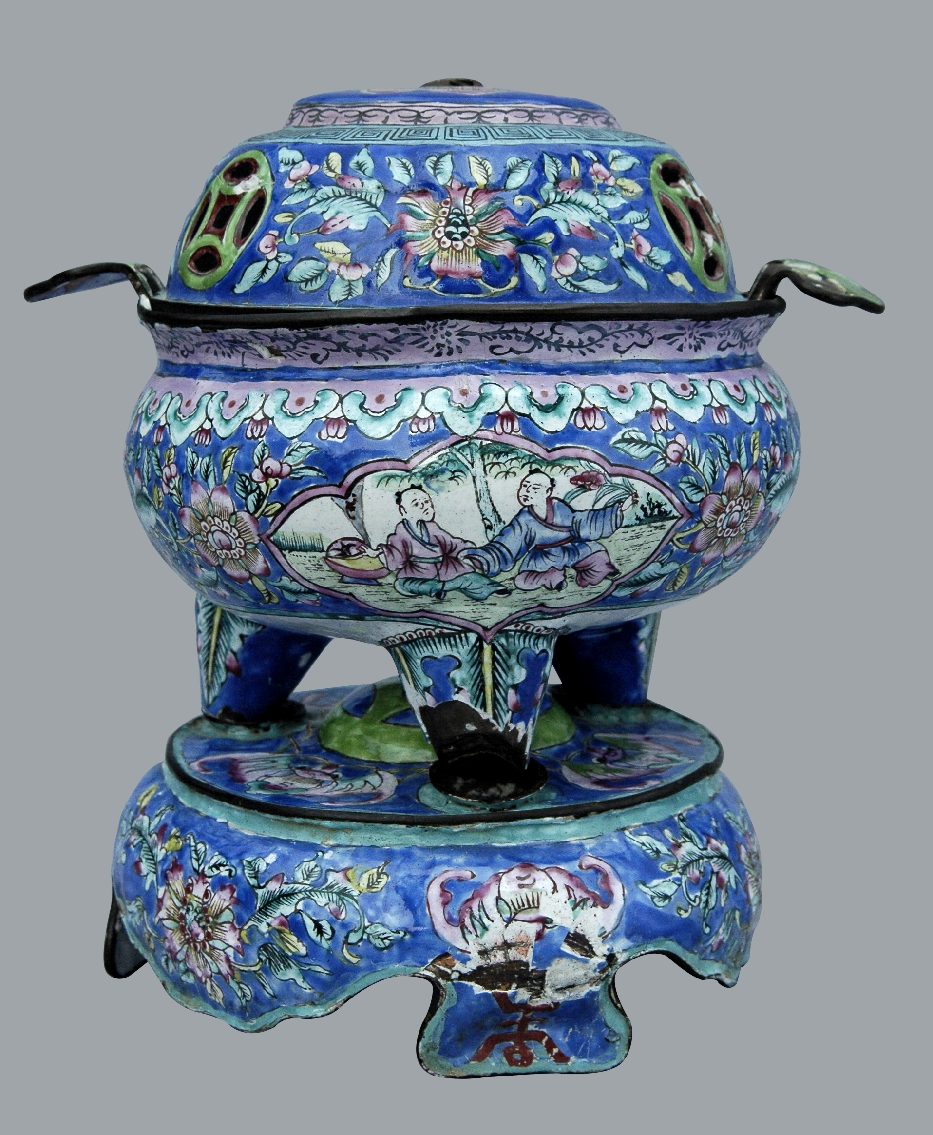 Lư trầm. Chất liệu: Pháp lam. Ảnh tự chụp tại Bảo tàng Mỹ thuật Cung đình Huế